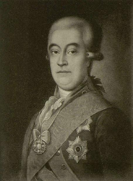 Николай Дмитриевич Дурново (174.-1816) — генерал-аншеф, сенатор, в царствование Екатерины II управлял комиссариатским департаментом